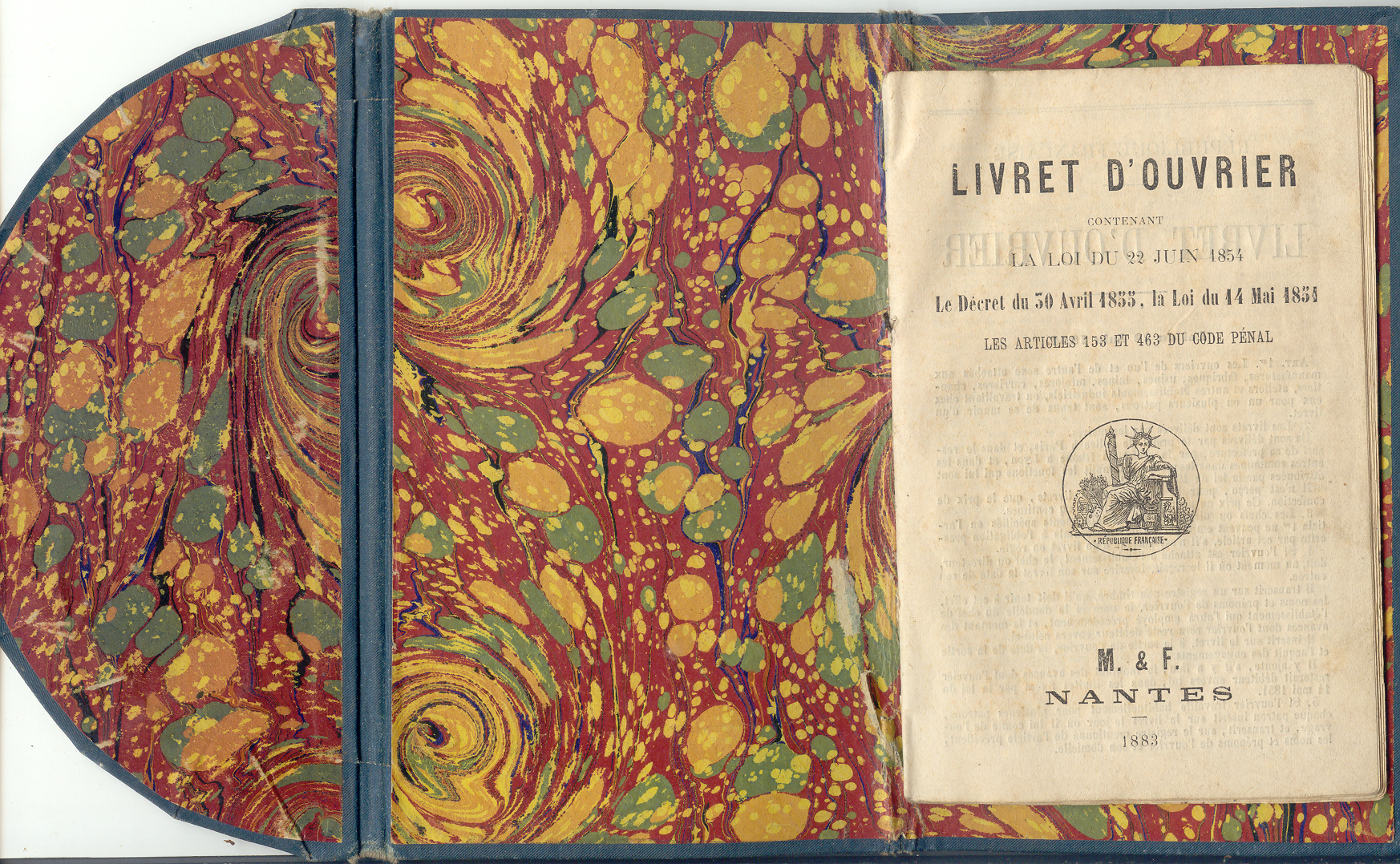 Scan d'un livret d'ouvrier contenant la loi du 22 juin 1854, le décret du 30 avril 1855, la loi du 14 mai 1854 et les articles 153 et 463 du Code pénal.